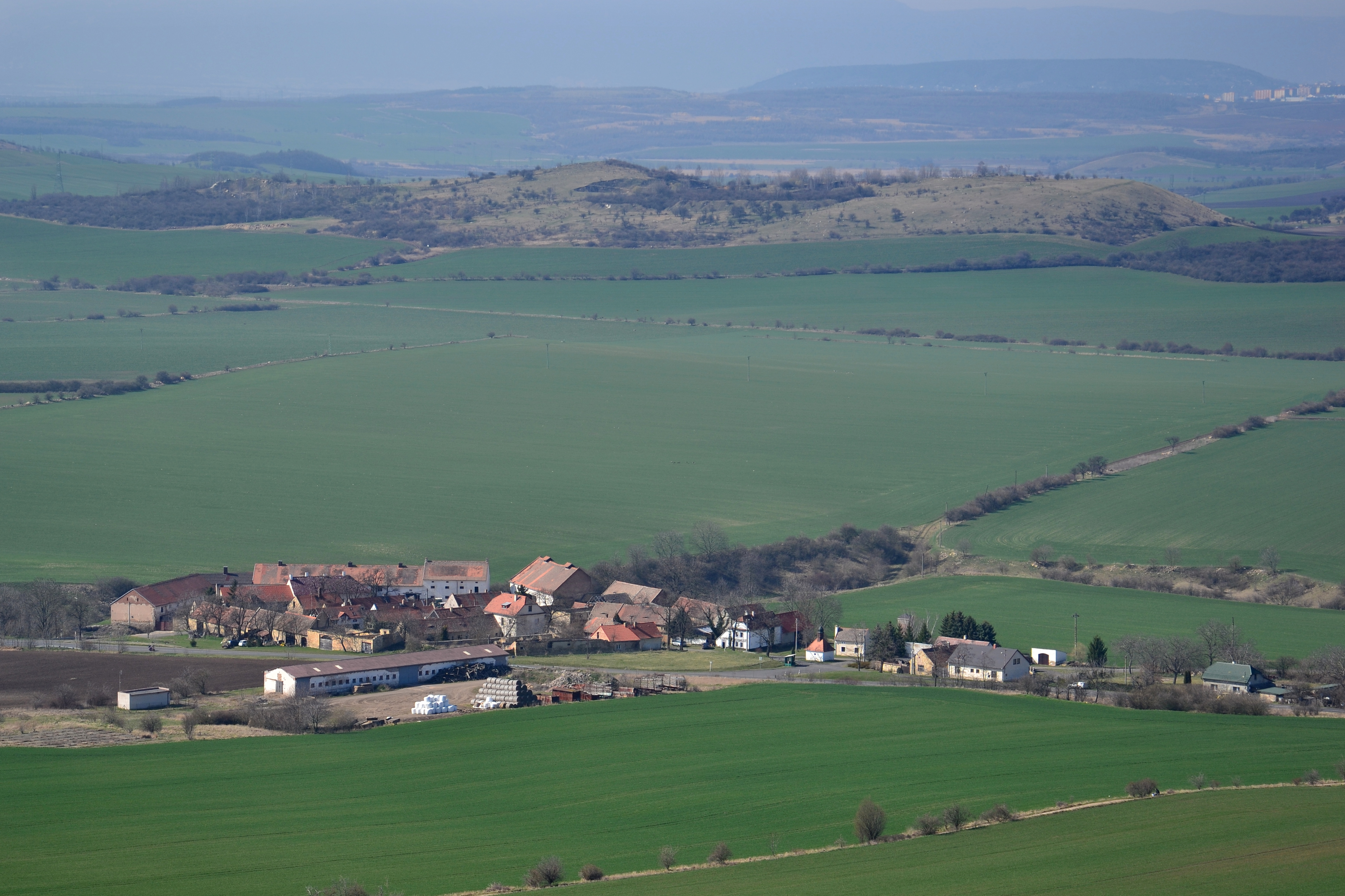 Hrádek – celkový pohled ze sedla na Rané